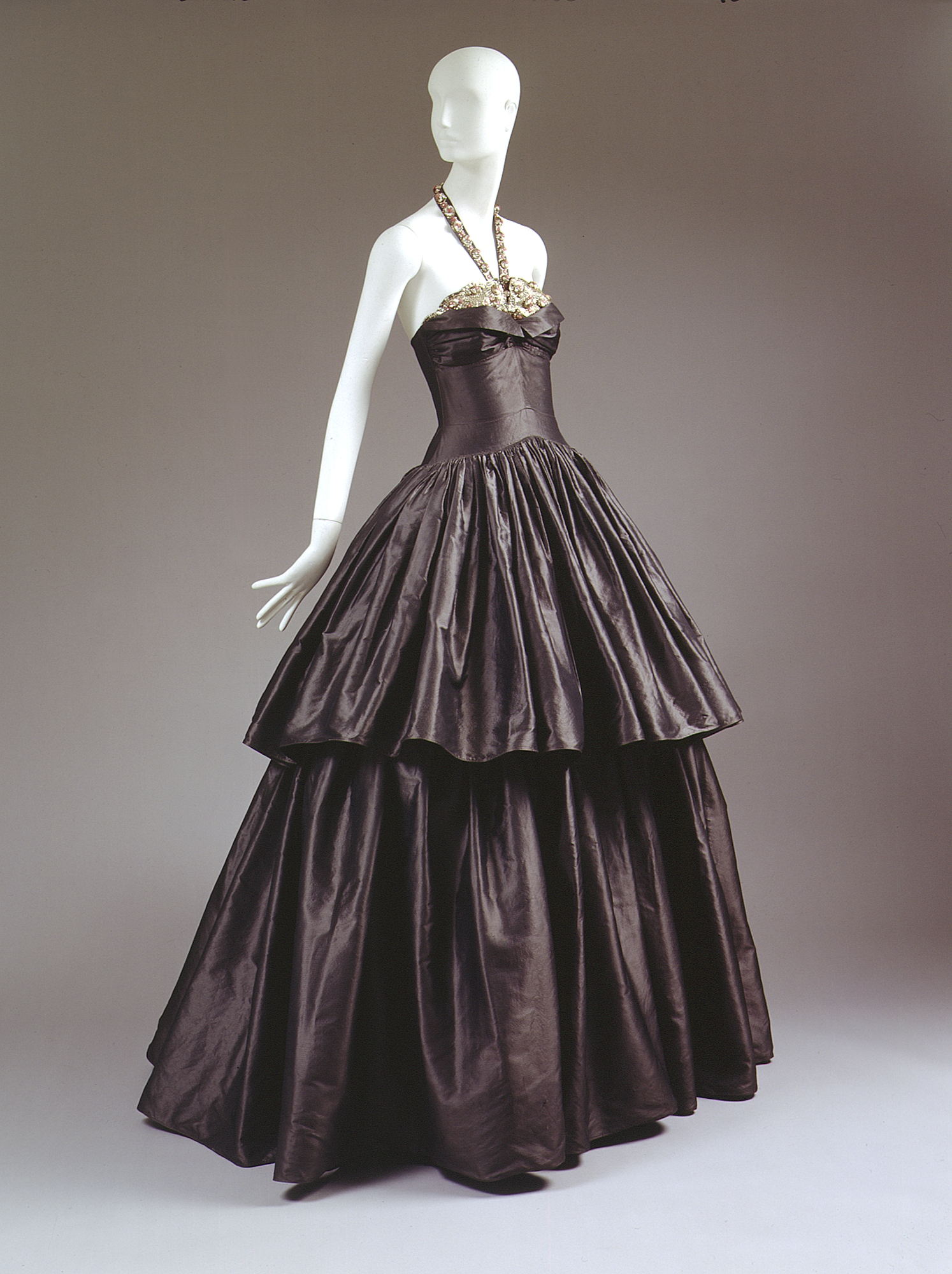 French; Evening dress